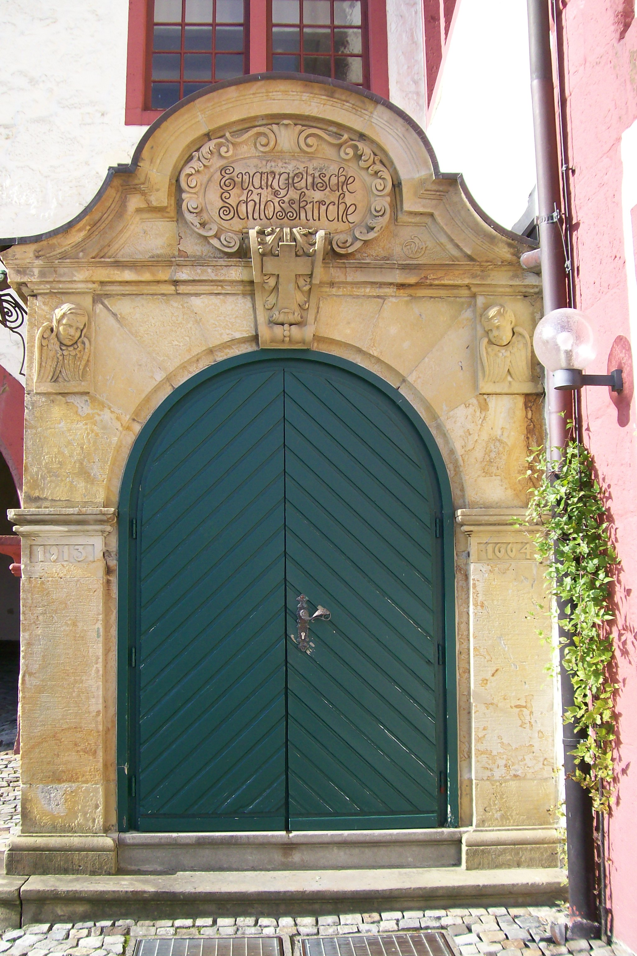 Schloss und Benediktinerabtei Iburg in Bad Iburg, Niedersachsen, Eingang zur Evangelisch-lutherischen Schlosskirche. Den Zugang durch ein 1913 angebautes Treppenhaus stiftete die Offiziersfrau Barta von Bardeleben, geborene Kerksieg. Ein früherer Aufgang hatte sich an anderer Stelle befunden. Die ehemalige protestantische Hofkirche hatte ursprünglich nur einen Zugang vom Inneren des Schlosses.